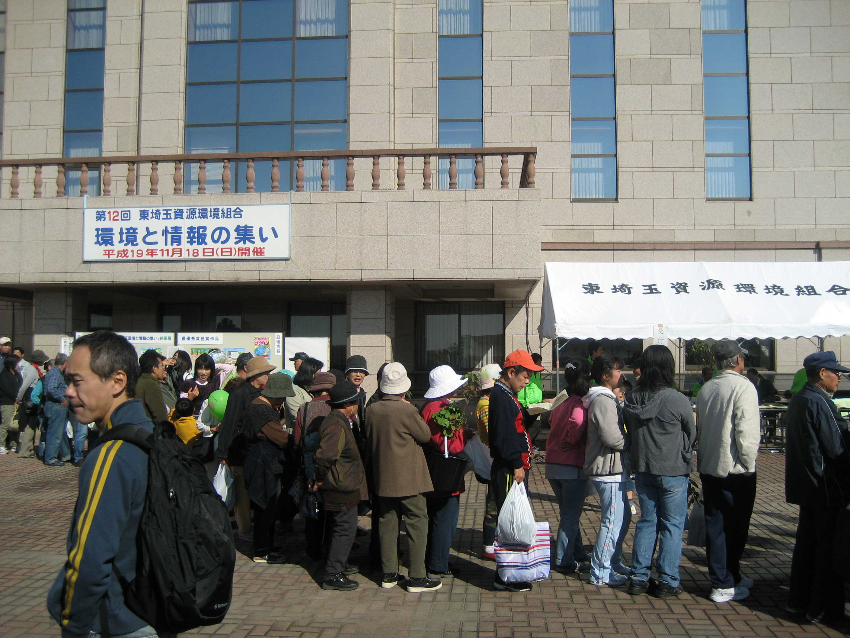 東埼玉資源環境組合環境の集い